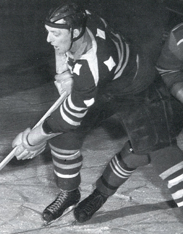 Åke Andersson i närkamp med Brynäs Yngve Feldt.